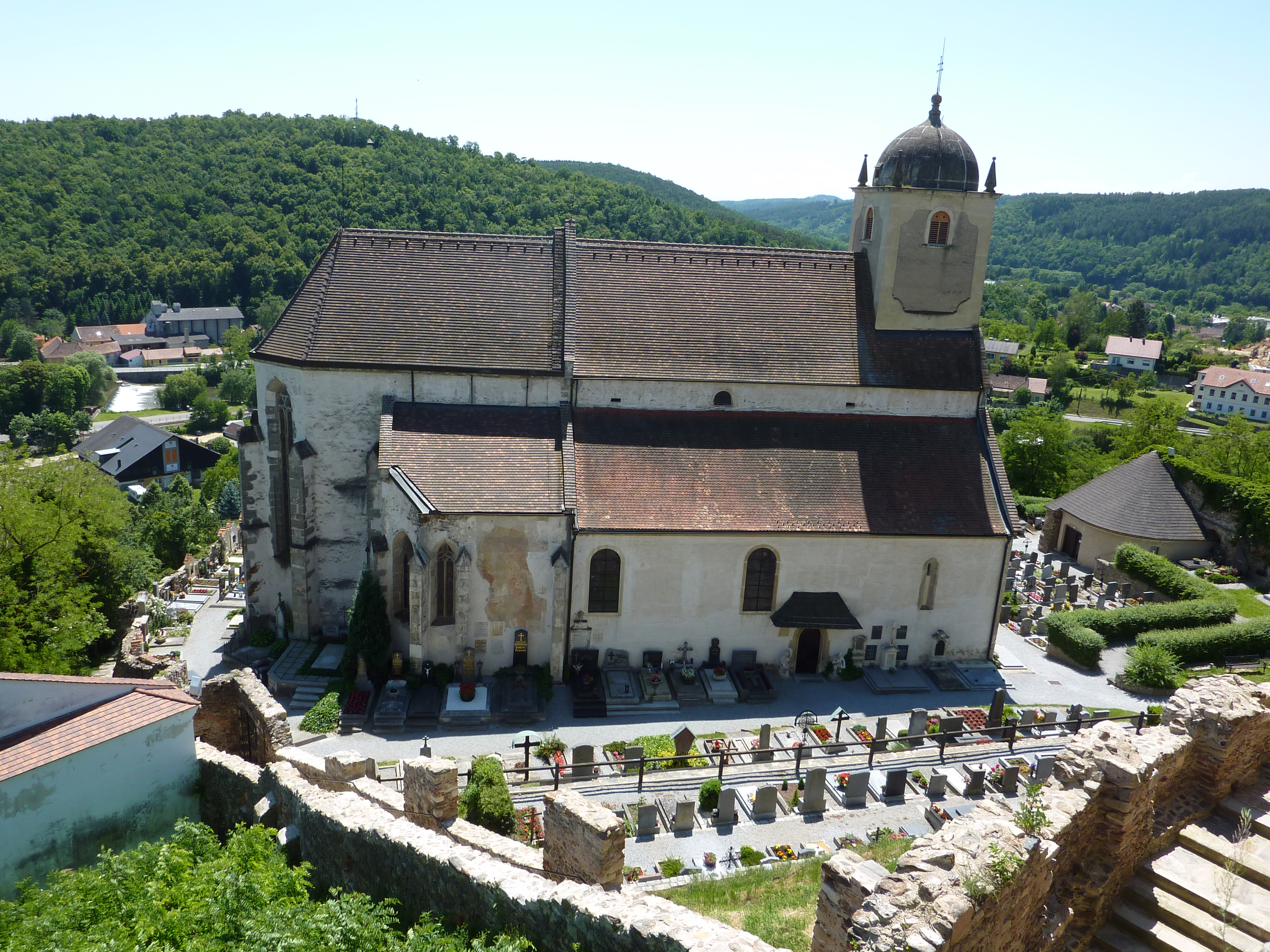 Pfarrkirche hl. Gertrud und Friedhof in Thumau am Kamp, Gars, Niederösterreich - von der Burgruine Gars aus gesehen